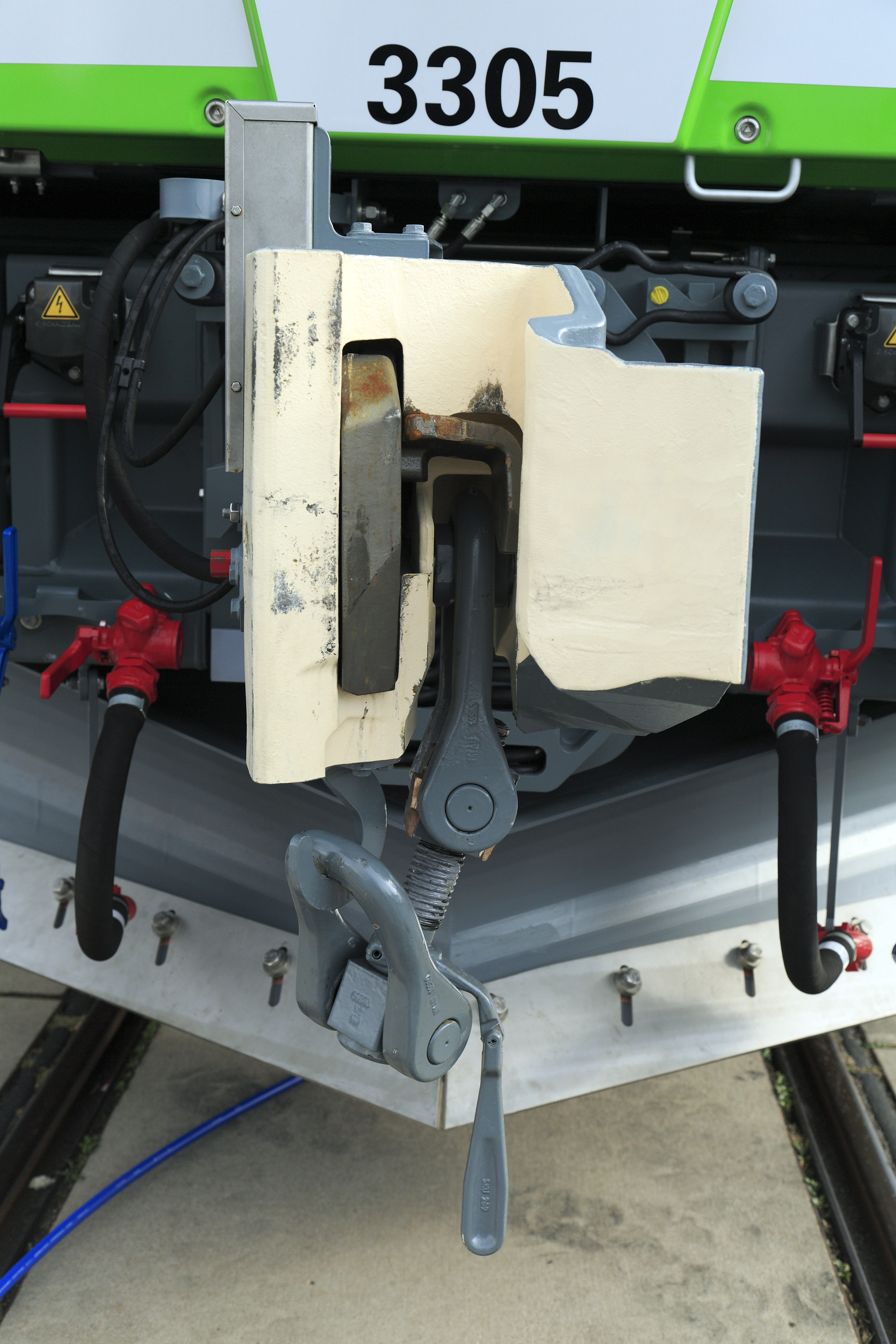 … an der Lokomotive 3103 305 (ex Sr3 3305) der VR. Durch einen Ausschnitt auf der Unterseite wurde es möglich, eine zusätzliche Schraubenkupplungskette in den Kuppelkopf zu integrieren. Damit wird die Bruchlast etwas verringert, sie liegt trotzdem noch über der der allerdings deutlich älteren amerikanischen Janneykupplung.